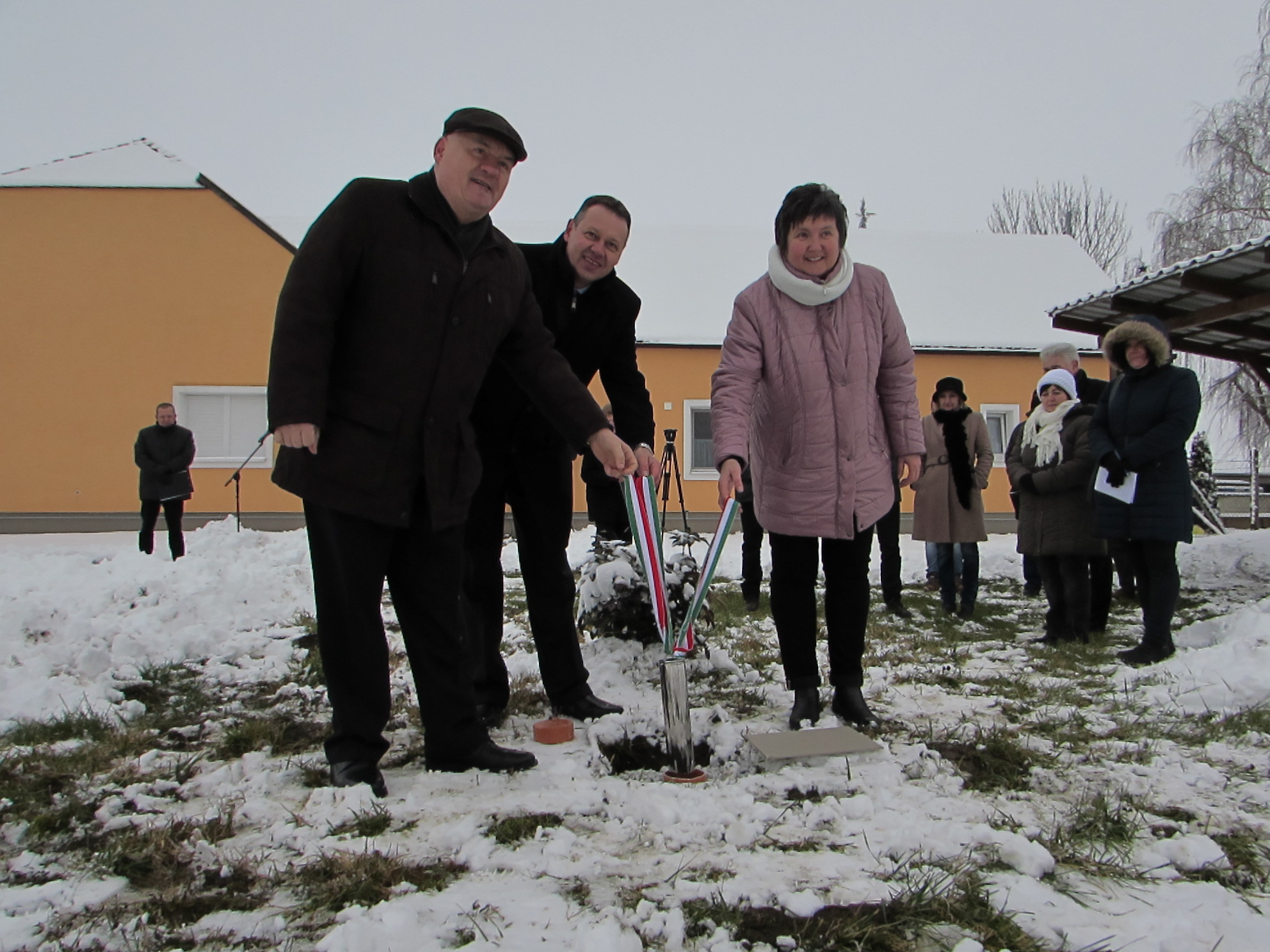 Balogunyom Községháza alapkő letétele. Balról Dr Hende Csaba; Középen Képíró Zsolt - Kivitelező- ; Jobbra Kiss Anita - Polgármester